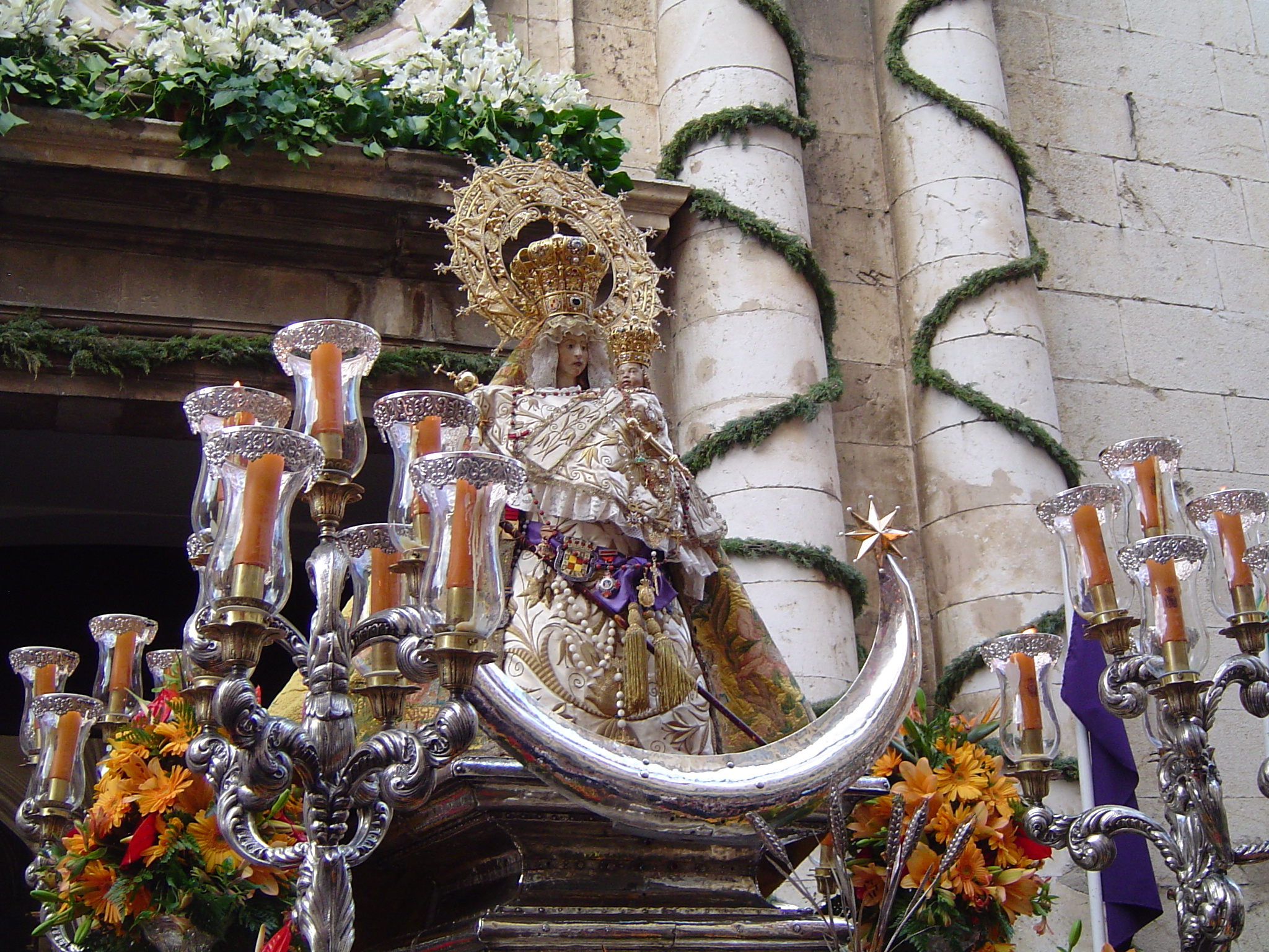 Virgen de la Capilla, patrona de Jaén, en la procesión de 2008.